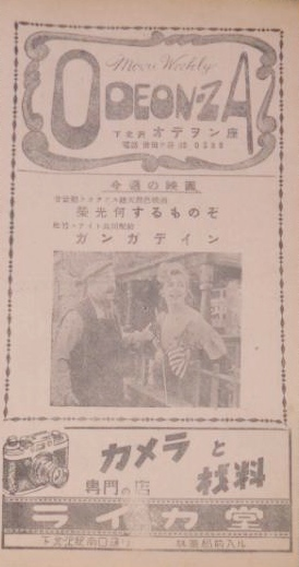 『下北沢オデヲンニュース』、1953年5月、表紙